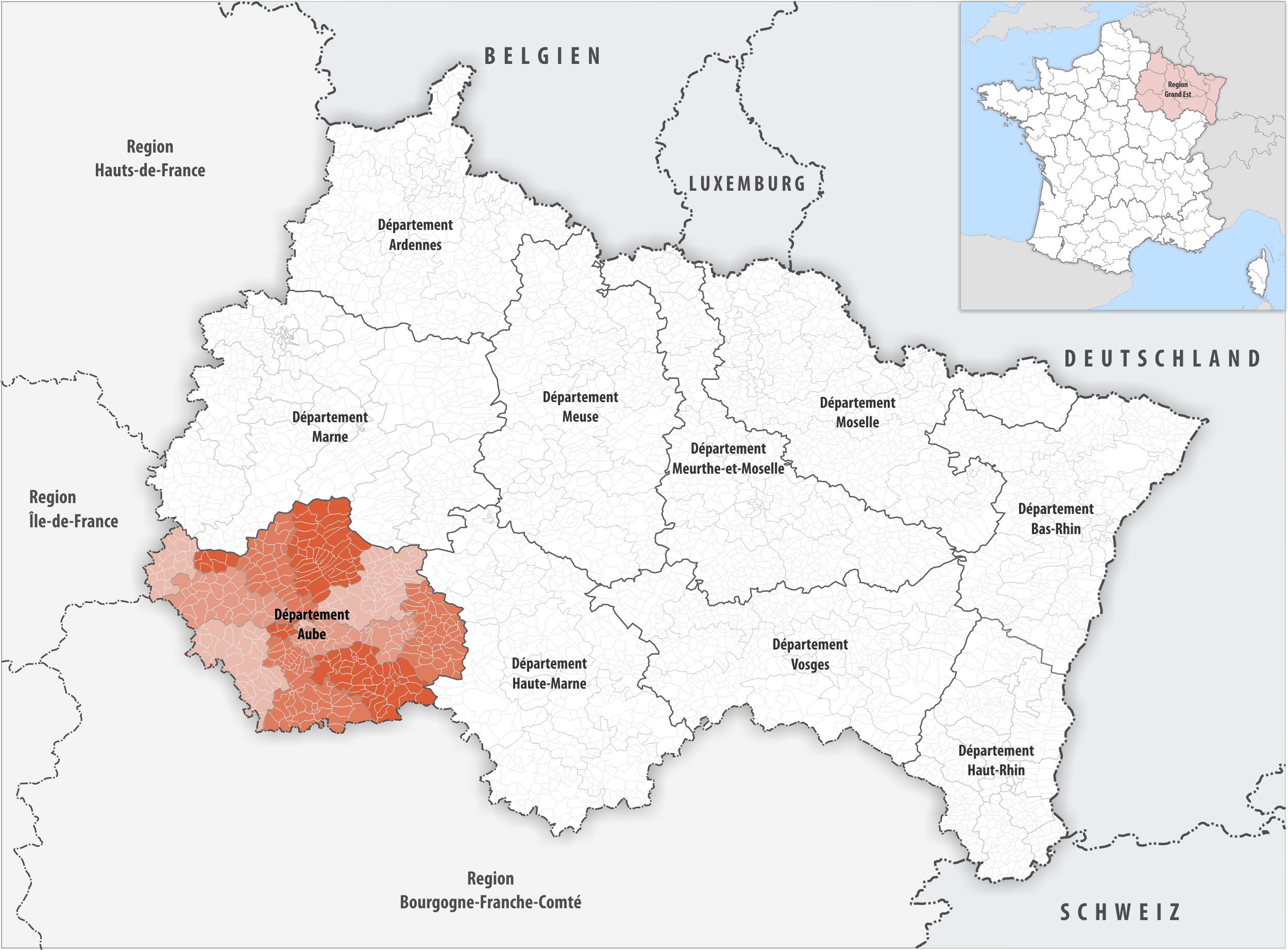 Lage des Departements Aube